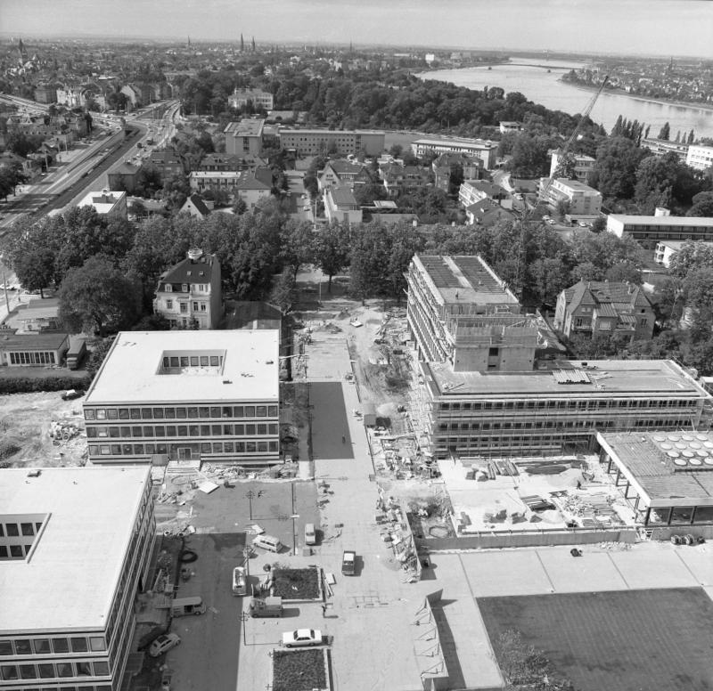 Übersichtsaufnahmen von Bonn und Bad Godesberg vom neuen Hochhaus im Tulpenfeld aus